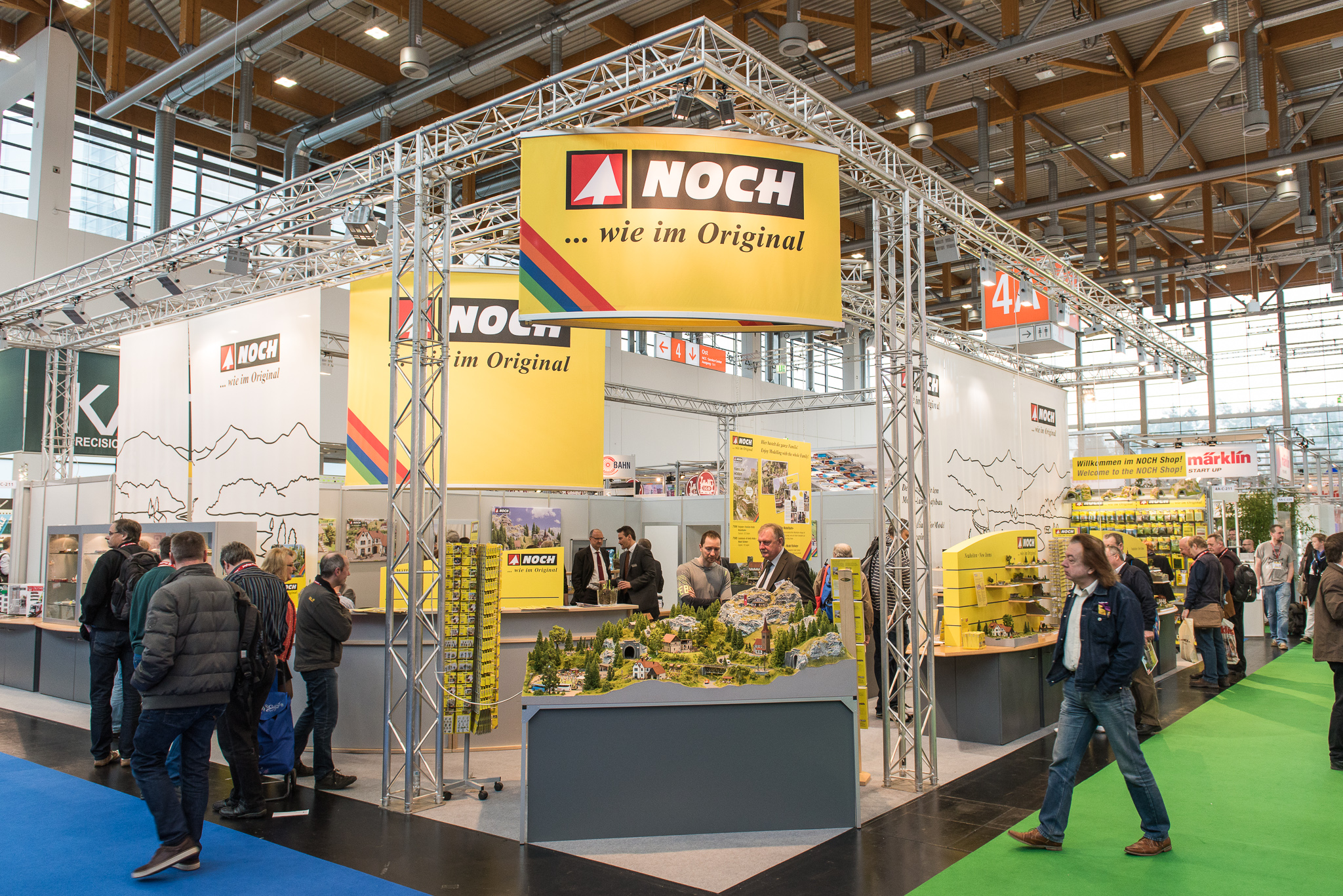 International Toy Fair Nürnberg,Messestand,Noch,Spielwarenmesse